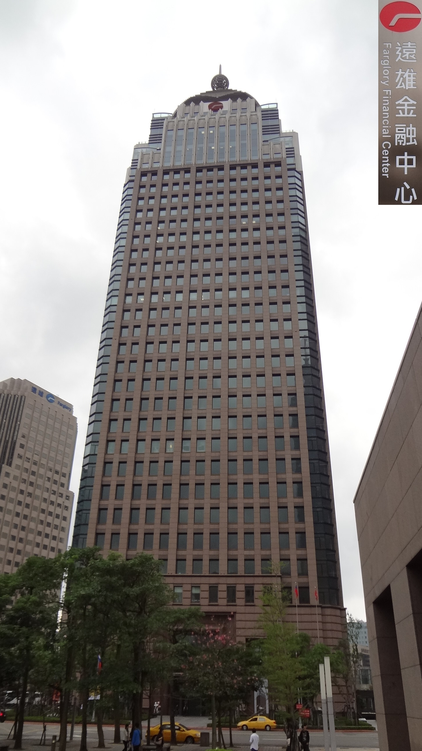 遠雄金融中心，位於臺灣臺北市信義區松高路1號。